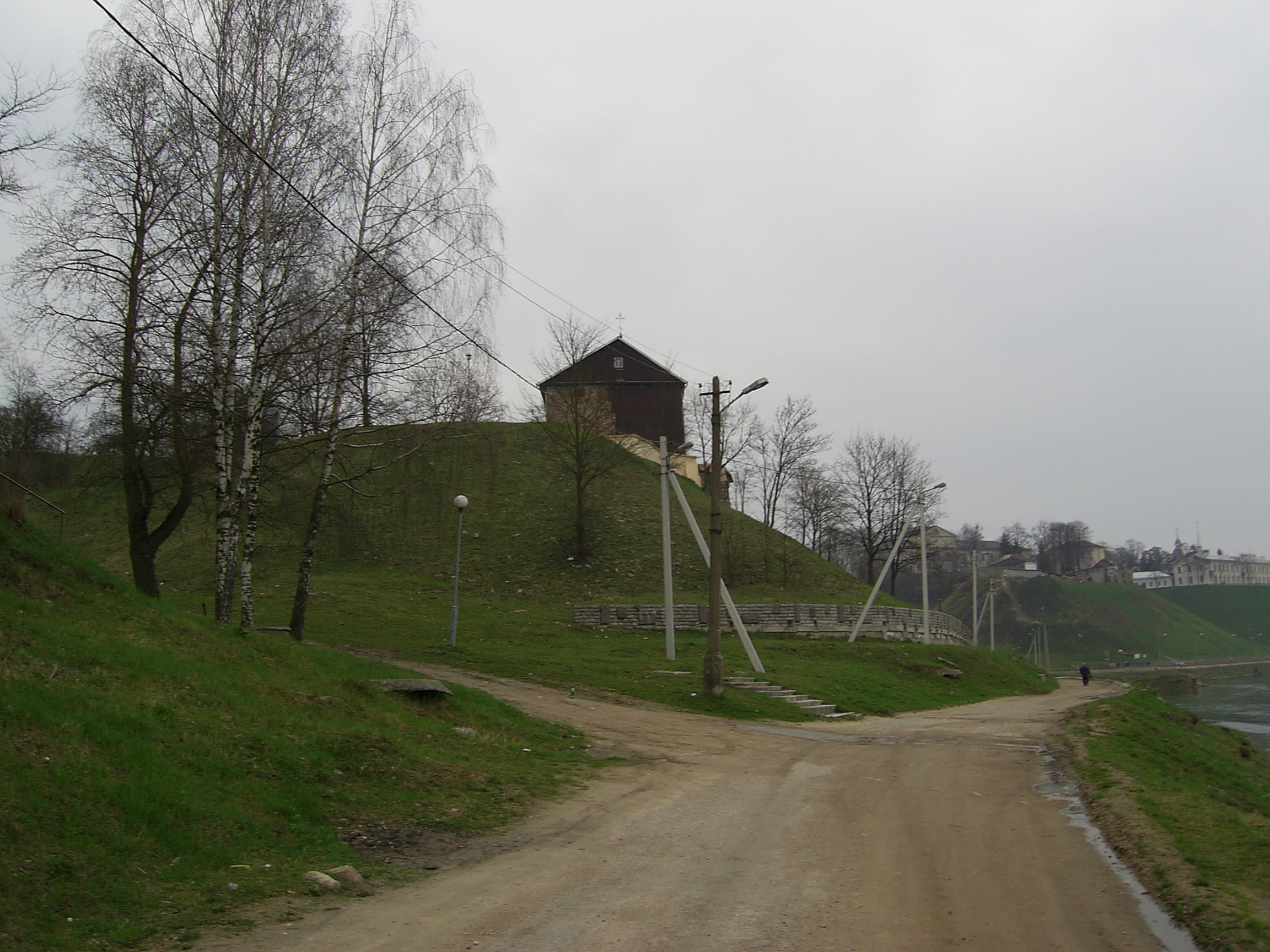 Барысаглебская (Каложская) царквадэкаратыўнае аздабленне царквы:каменны і маёлікавы дэкор на фасадахфрагмент арнаментальнага дэкору падлогіфрагменты жывапісу ў інтэр'еры. г. Гродна This is a photo of Belarusian heritage monument. Reference number: 410Г000004 ( WLM)